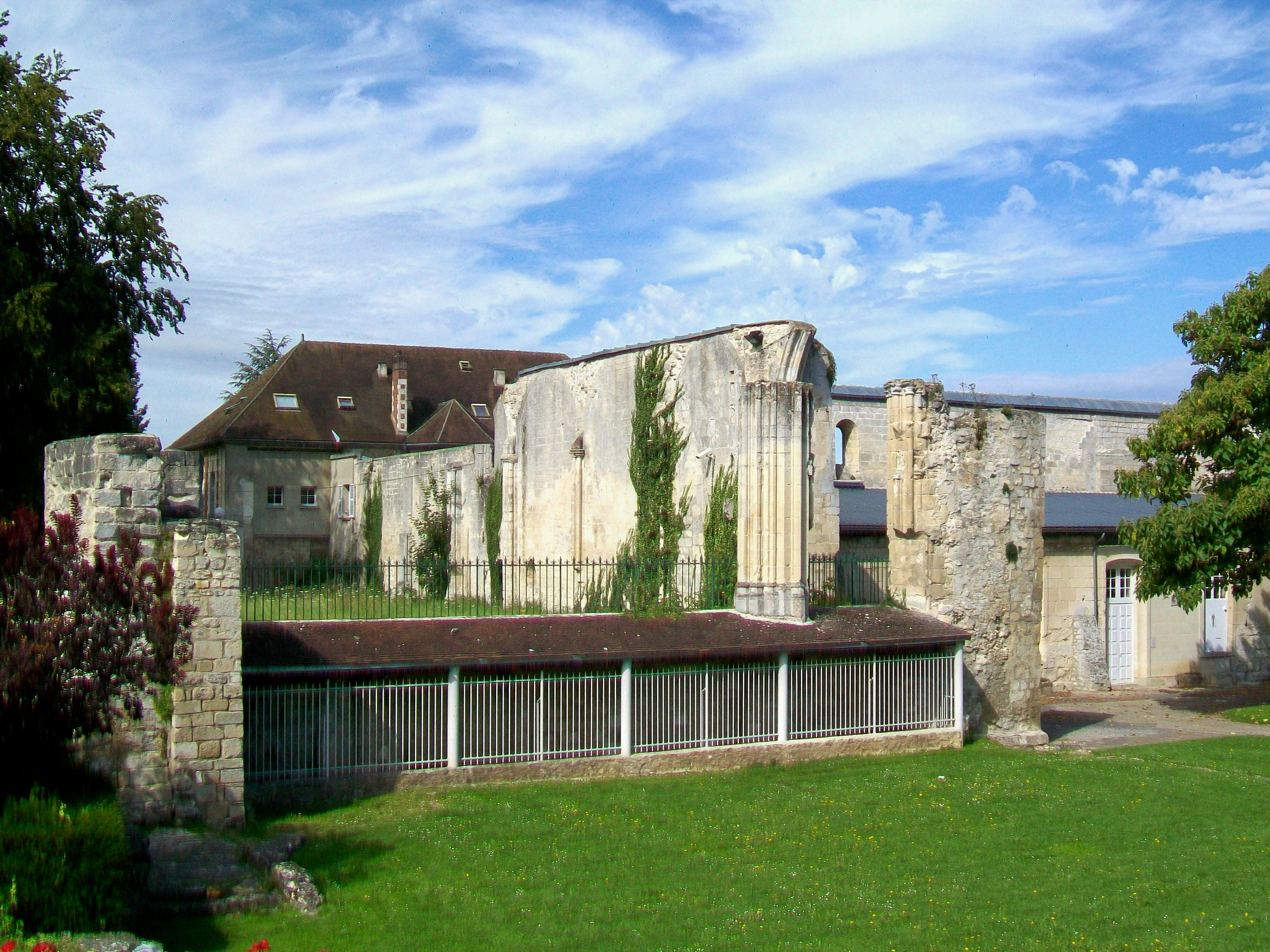 Emplacement du chœur de l'abbatiale ; au fond, un bâtiment du XVIIIe siècle ; à droite, ruines d'un bâtiment conventuel médiéval avec une construction moderne au premier plan.